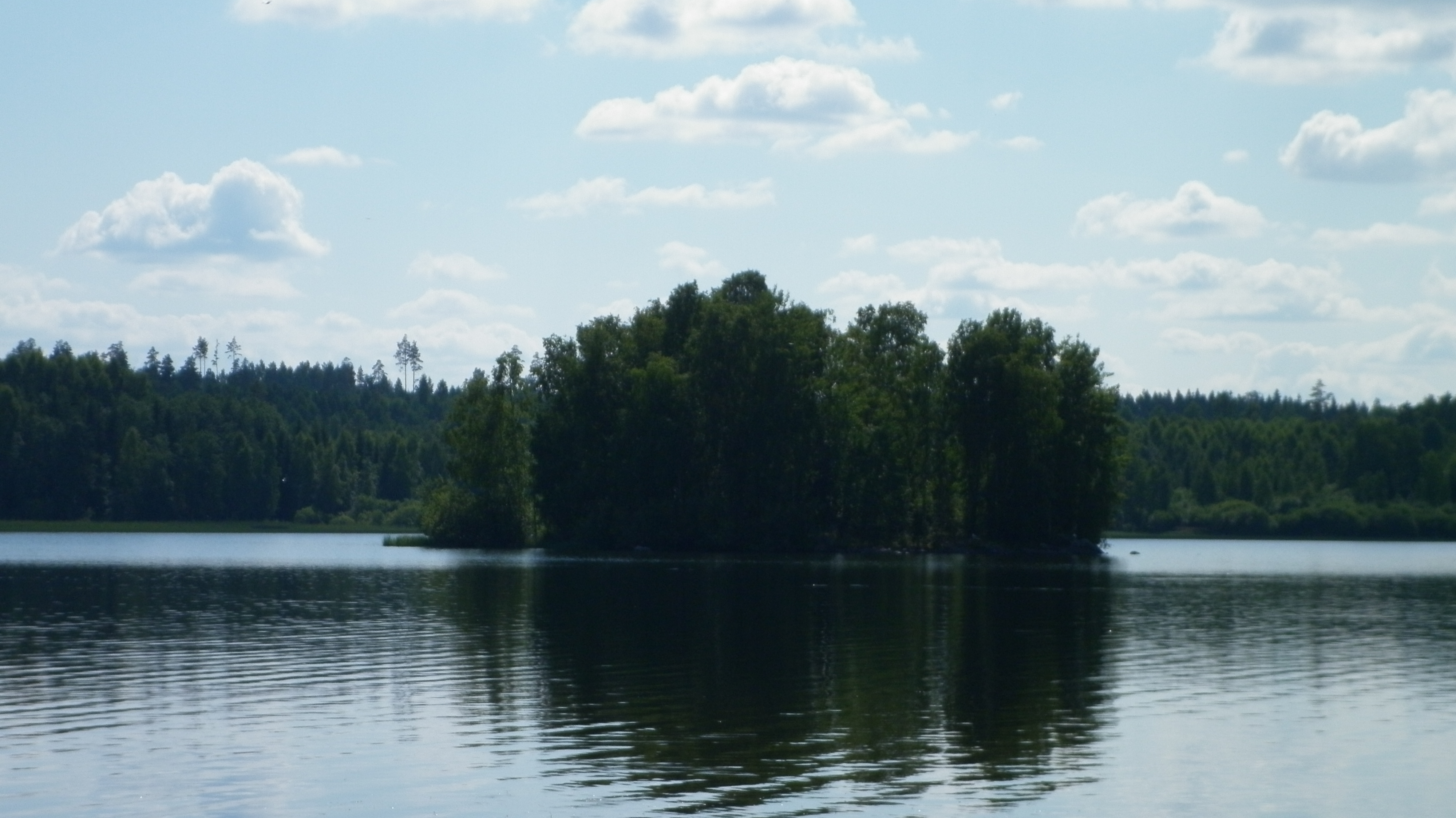 Ormajärven saari